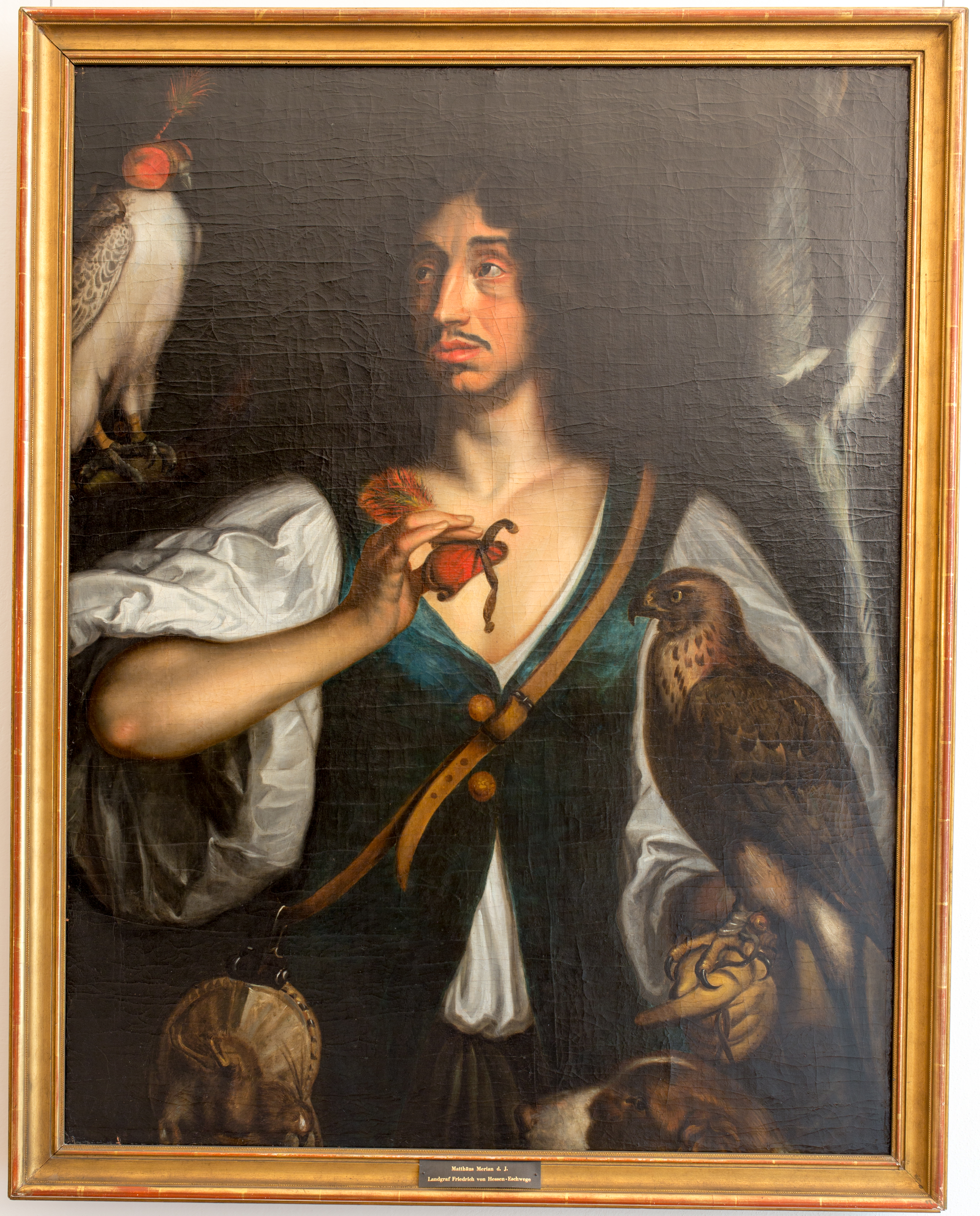 Matthäus Merian der Jüngere Landgraf Friedrich von Hessen-Eschwege als Falkner. vor 1655 Landgraf Friedrich von Hessen-Eschwege (1617–1655) war Offizier in schwedischen Diensten. In seinem Todesjahr kam er an den brandenburgischen Hof und führte der Falknerei in Lehnin die Dressurerfolge seiner mitgebrachten Vögel vor. Die Zuschreibung an Merian (1621–1687) erfolgte aufgrund der verbürgten Treffen der beiden 1649 und 1650, bei denen Merian die Porträts der schwedischen Generäle und Obristen anfertige.